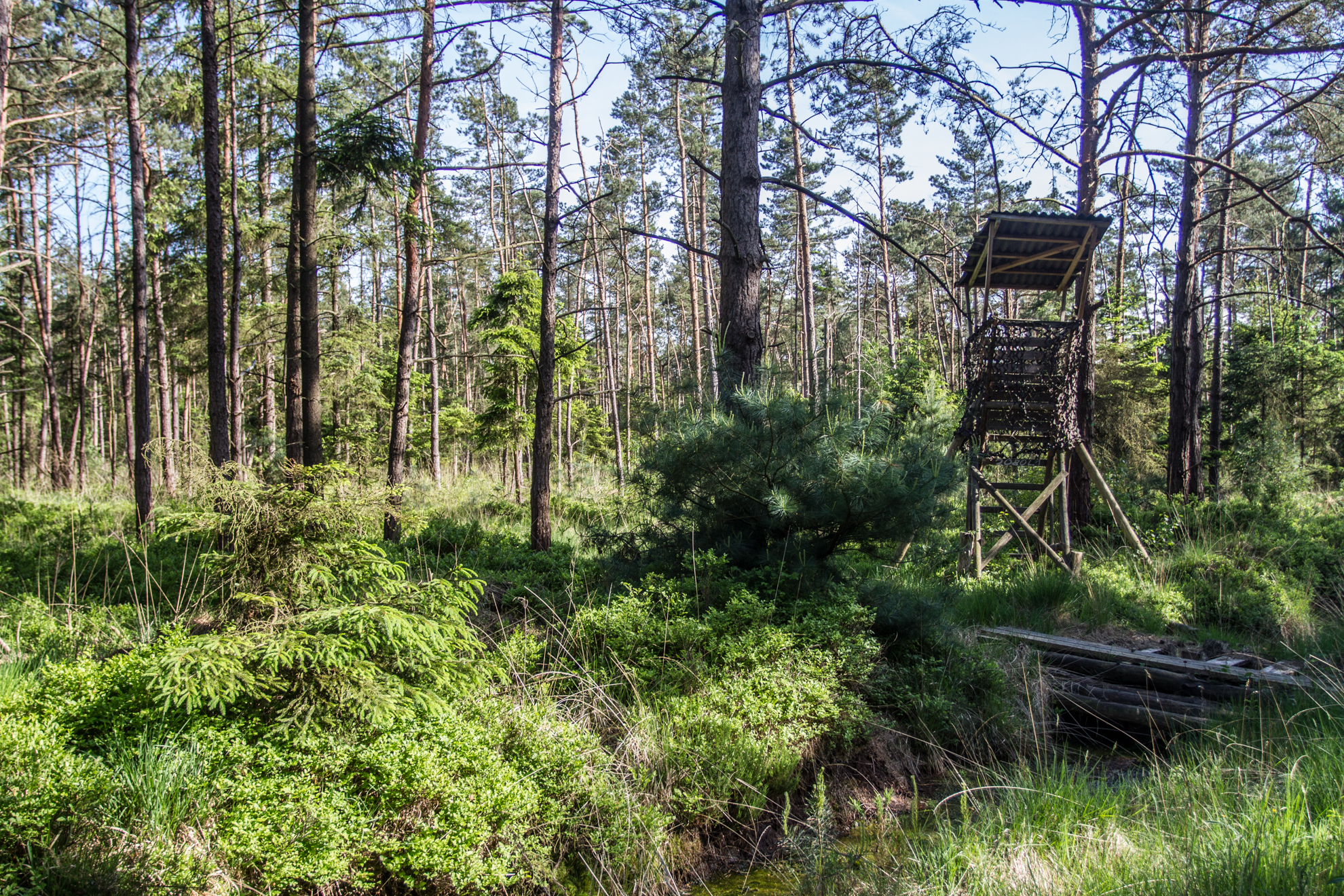 Impression des Naturschutzgebietes „Holzurburg am Bederkesaer See“